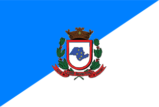 Bandeira de - SP - Brasil.